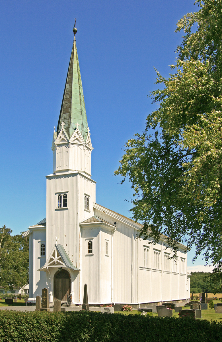 Berg church, Larvik, Norway